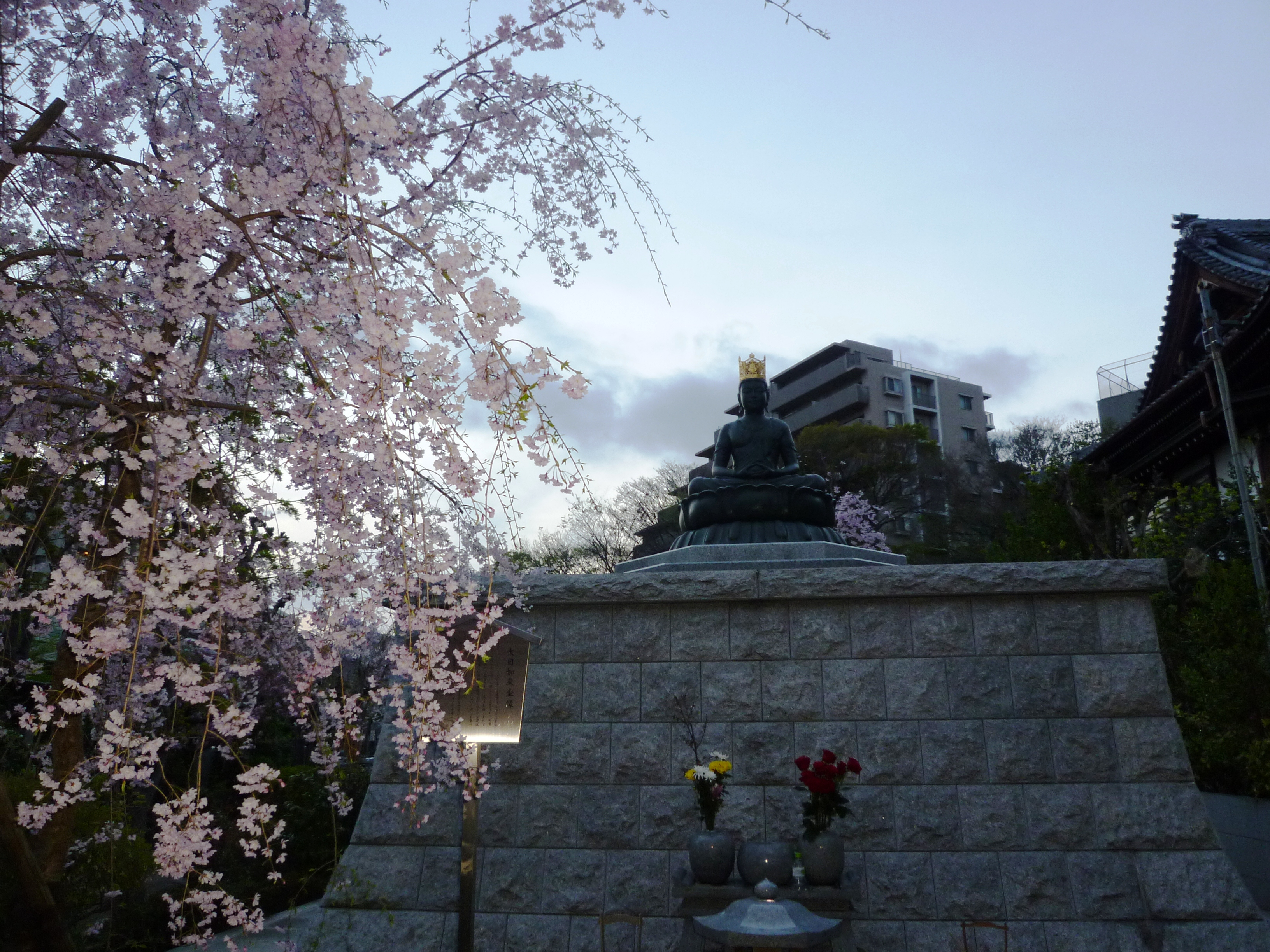 長徳寺大日如来